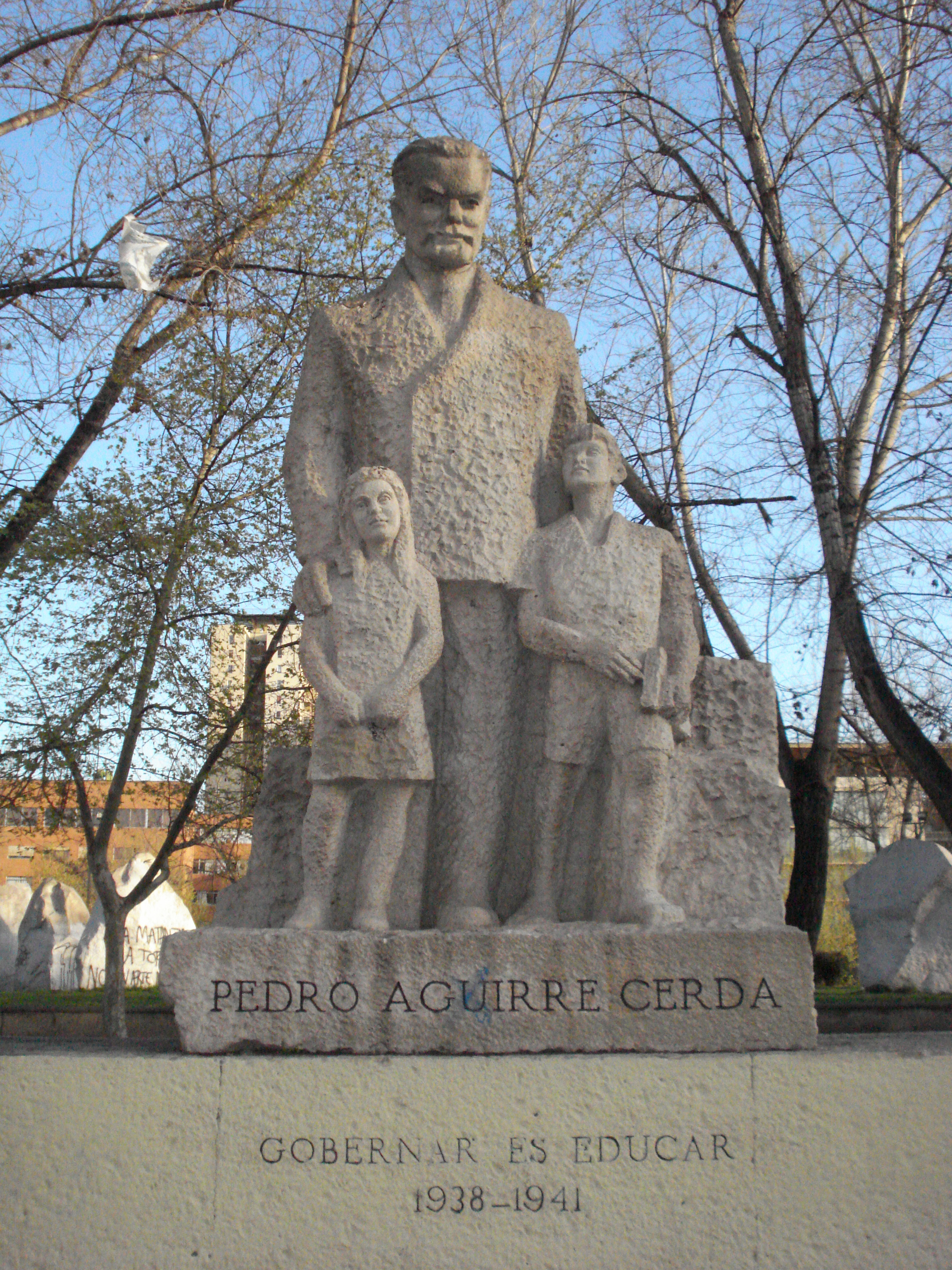 Estatua de Pedro Aguirre Cerda, obra de Galvarino Ponce ubicada en el parque Almagro de Santiago.